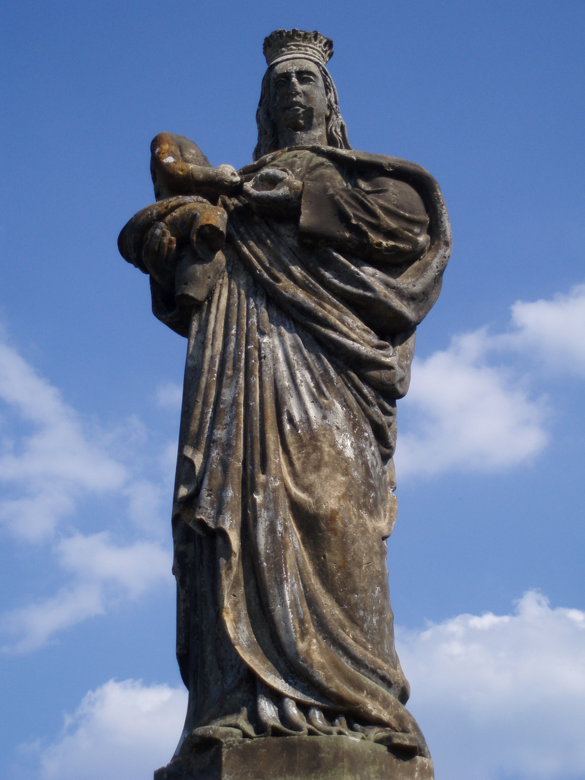 Socha Panny Marie v Březhradě